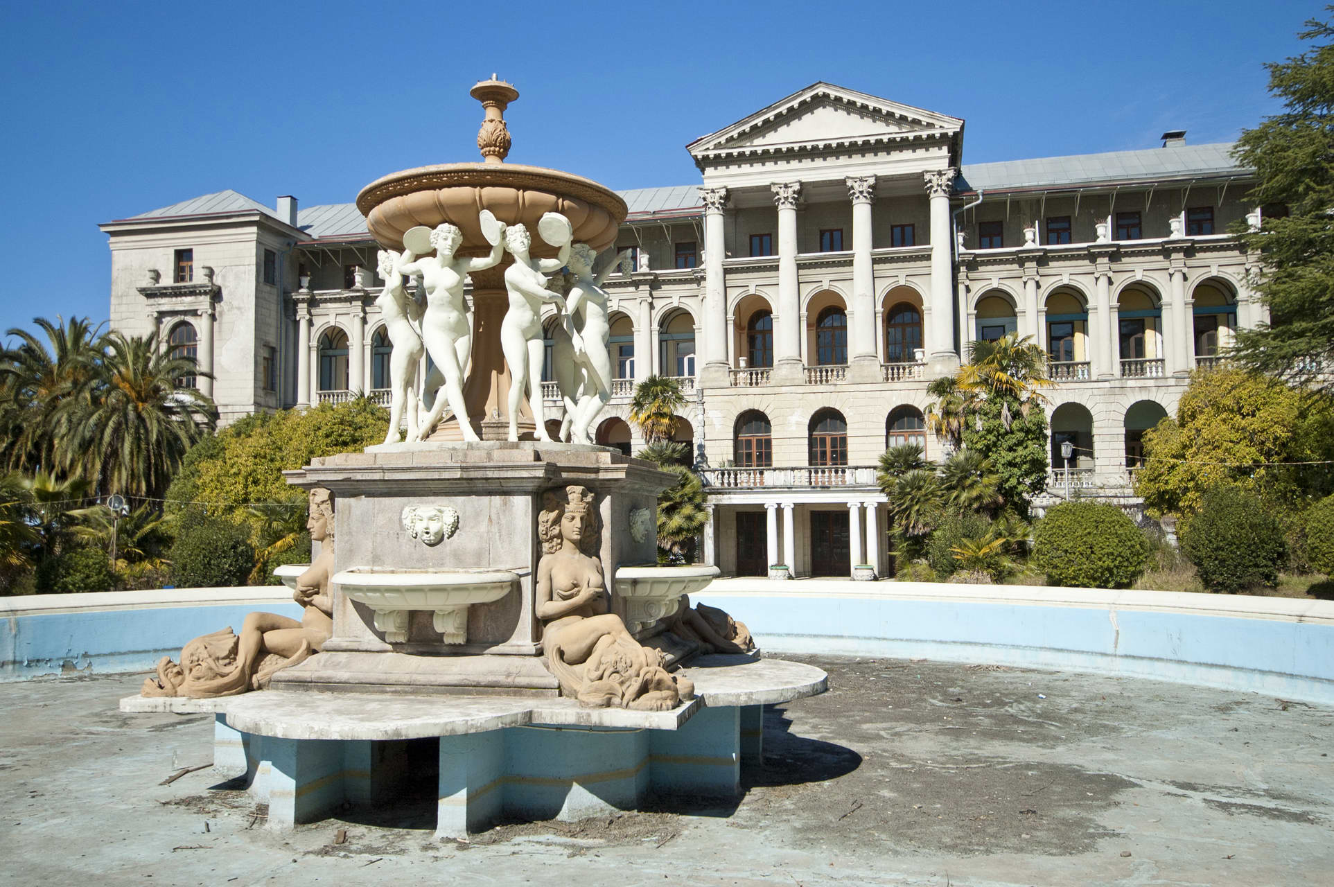 Здание санатория «Орджоникидзе» (Краснодарский край, Сочи, Курортный пр.)